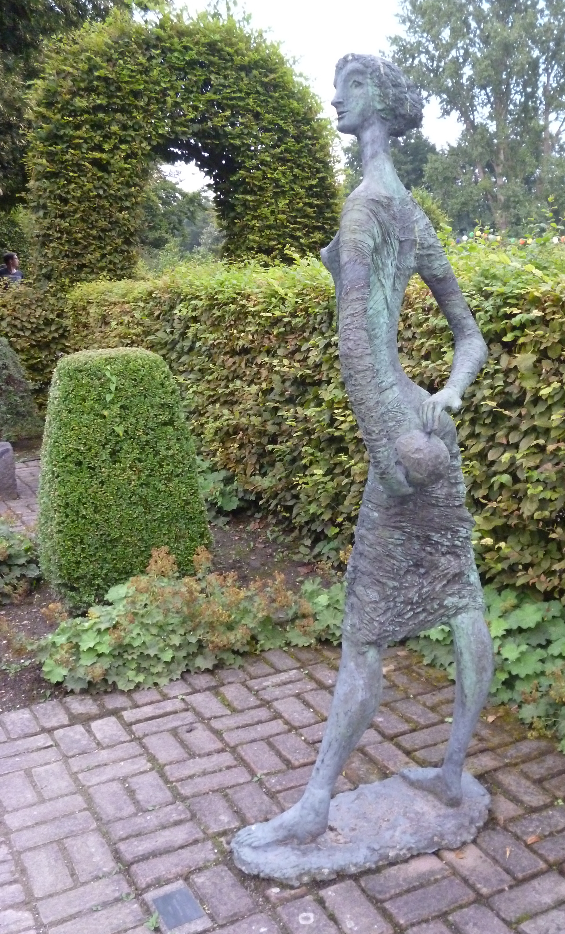 Mädchen mit Ball, von Almuth Lütkenhaus, Bronze